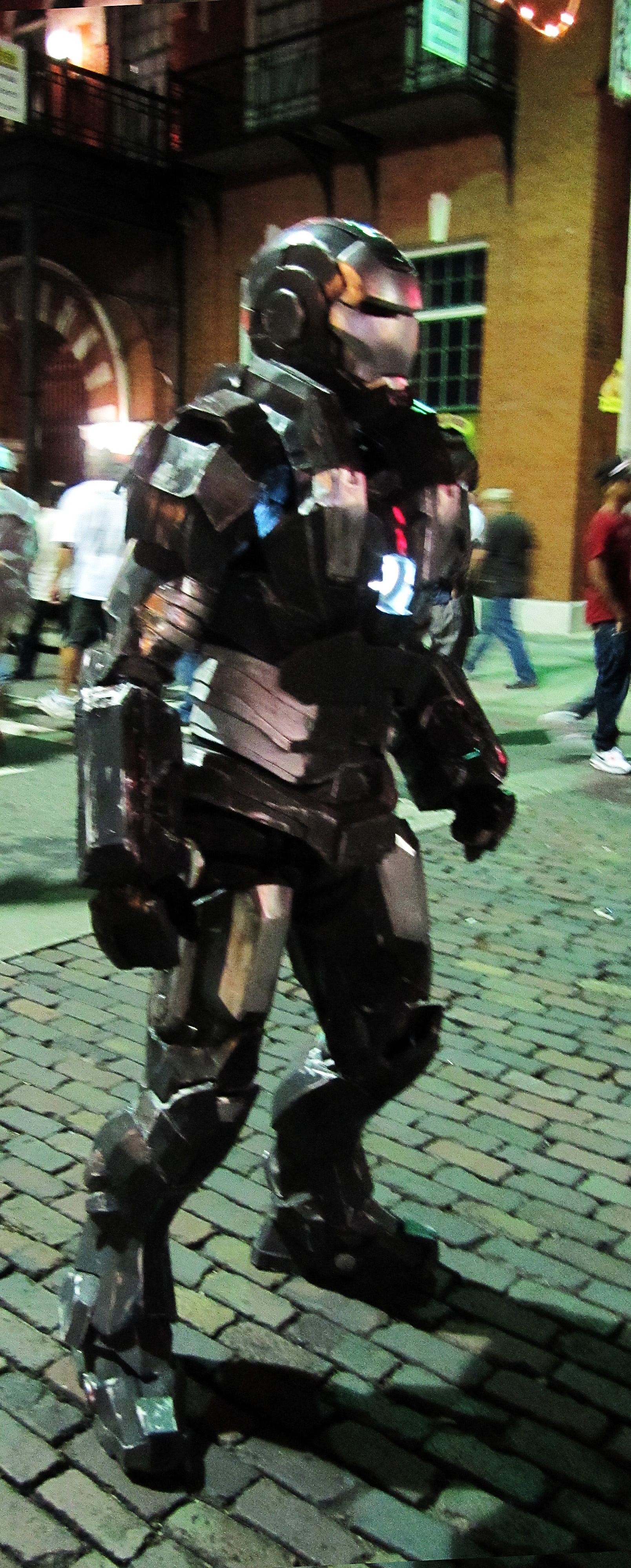 War Machine Guavaween 2011